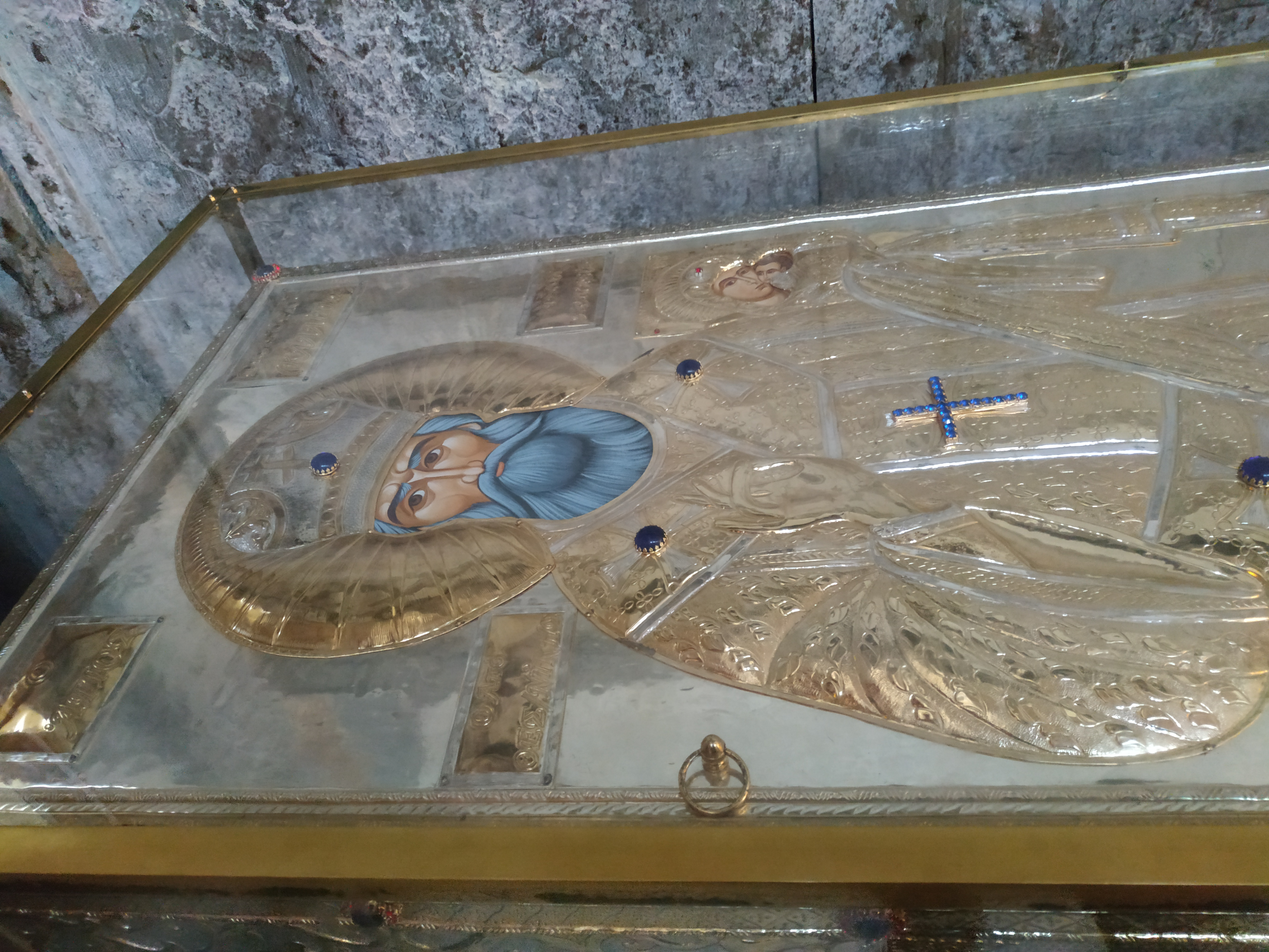 рака з мощами святого Григорія Калідіса. Фесалоніки